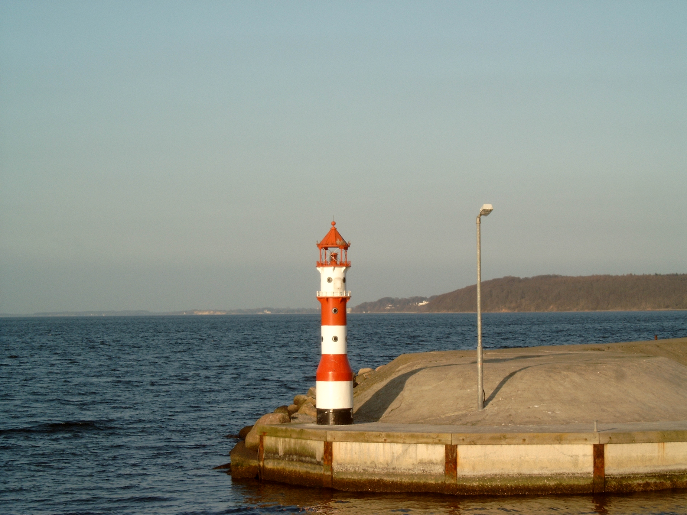 Roter Leuchtturm Fahrensodde Flensburg